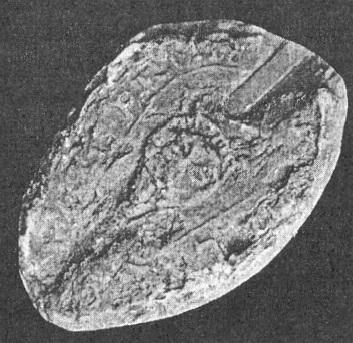 Hahót nembeli Panyit pecsétje az 1230-as évekből (ökörfej, kivehetetlen)